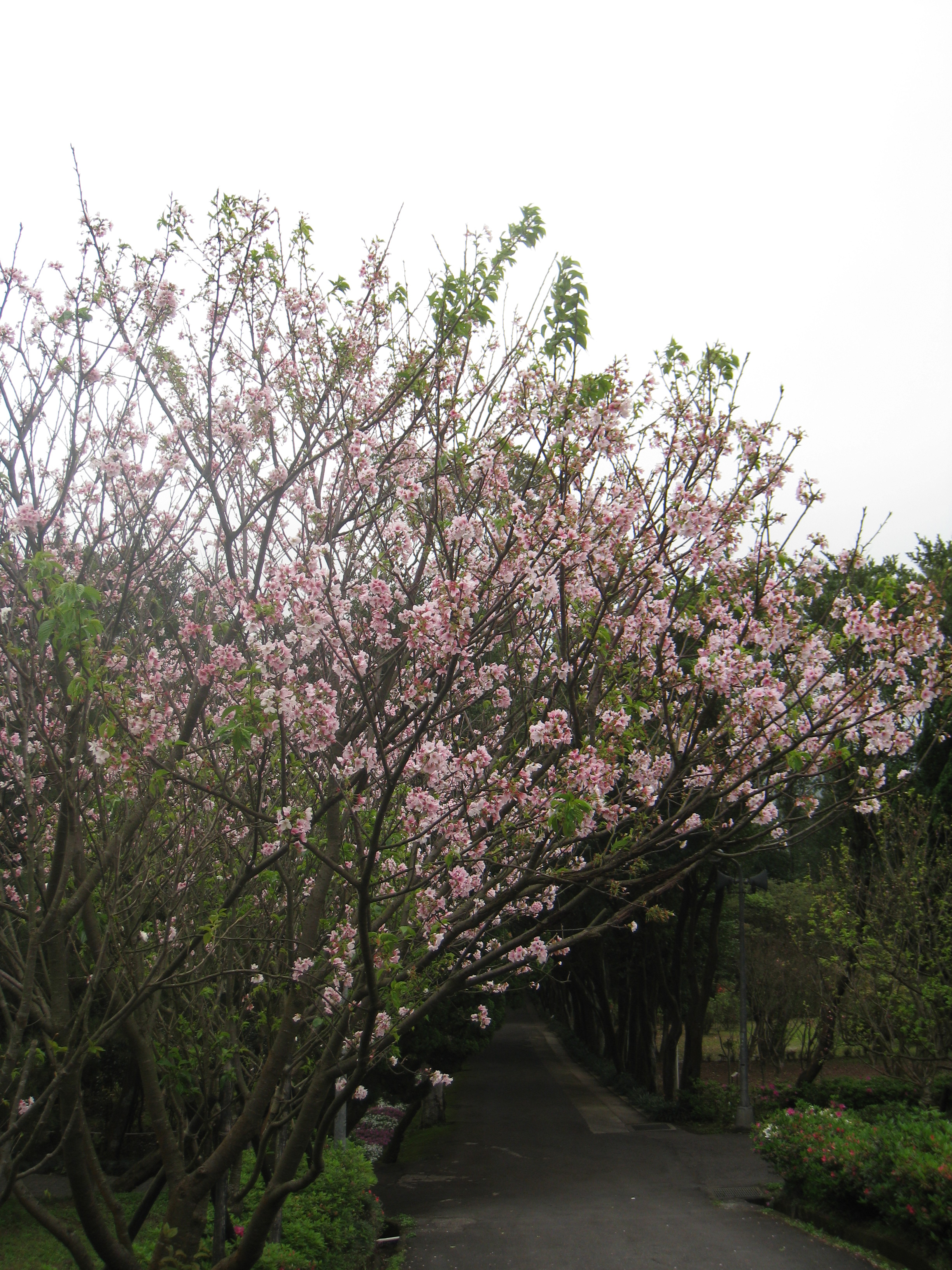 陽明山上微冷的天氣是櫻花最適合的生存環境。